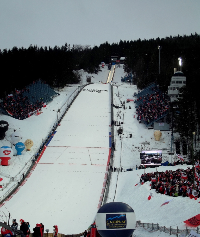 Wielka Krokiew.Zdjęcie zrobione podczas zawodów Pucharu Świata w Zakopanem w kokach narciarskich ze stycznia 2012 r.